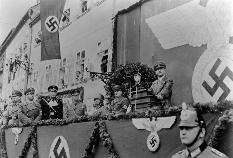 Staatsbesuch des Reichs und Preußischen Ministers des Innern Dr. Wilhelm Frick in Sudetenland